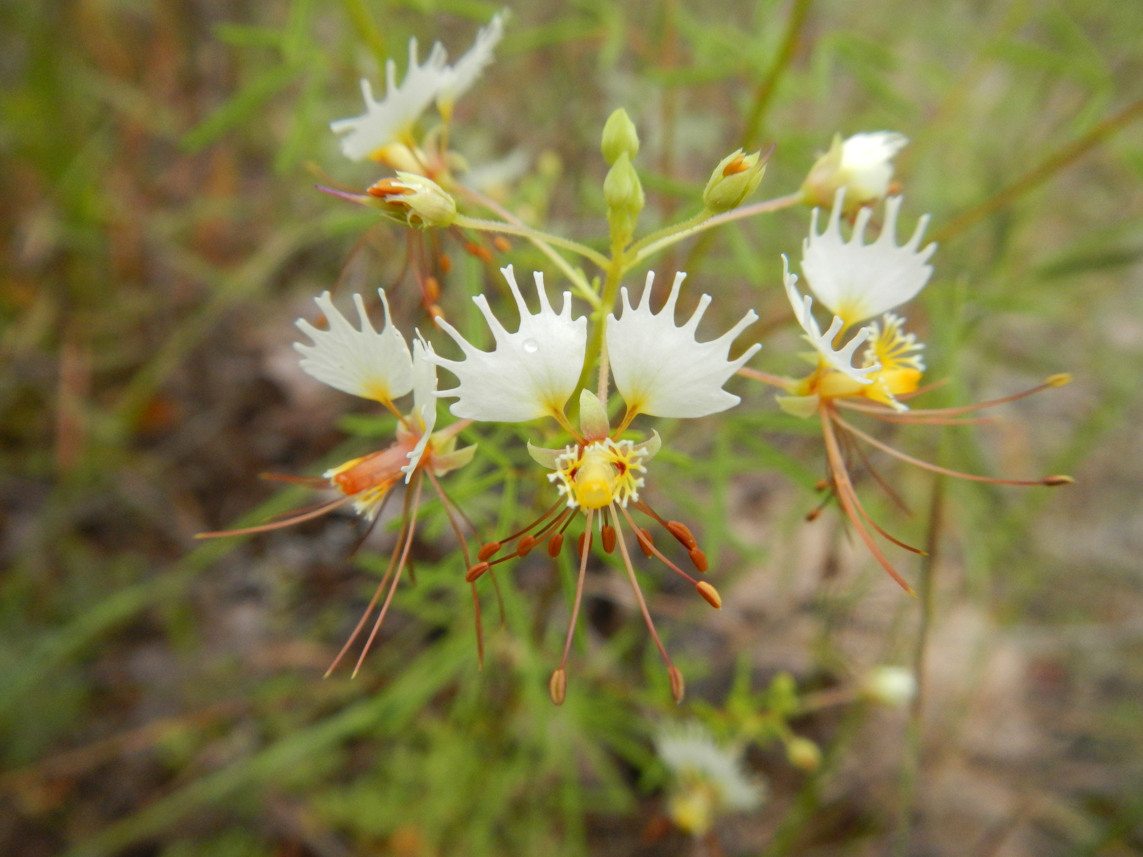 Polanisia erosa